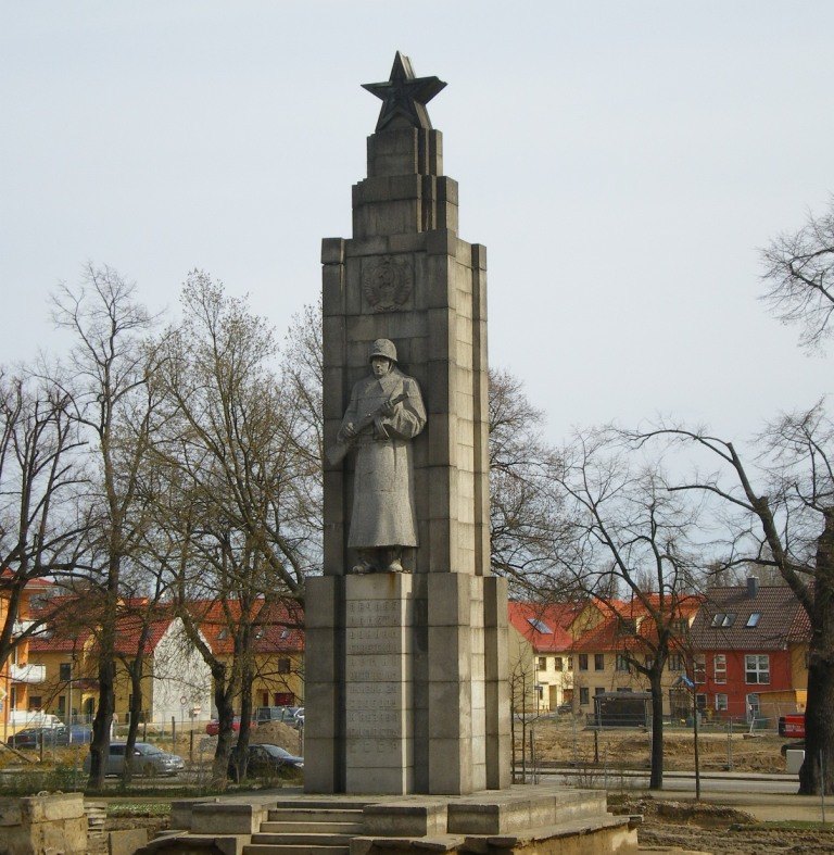 Sowjetisches Ehrenmal in Frankfurt (Oder)